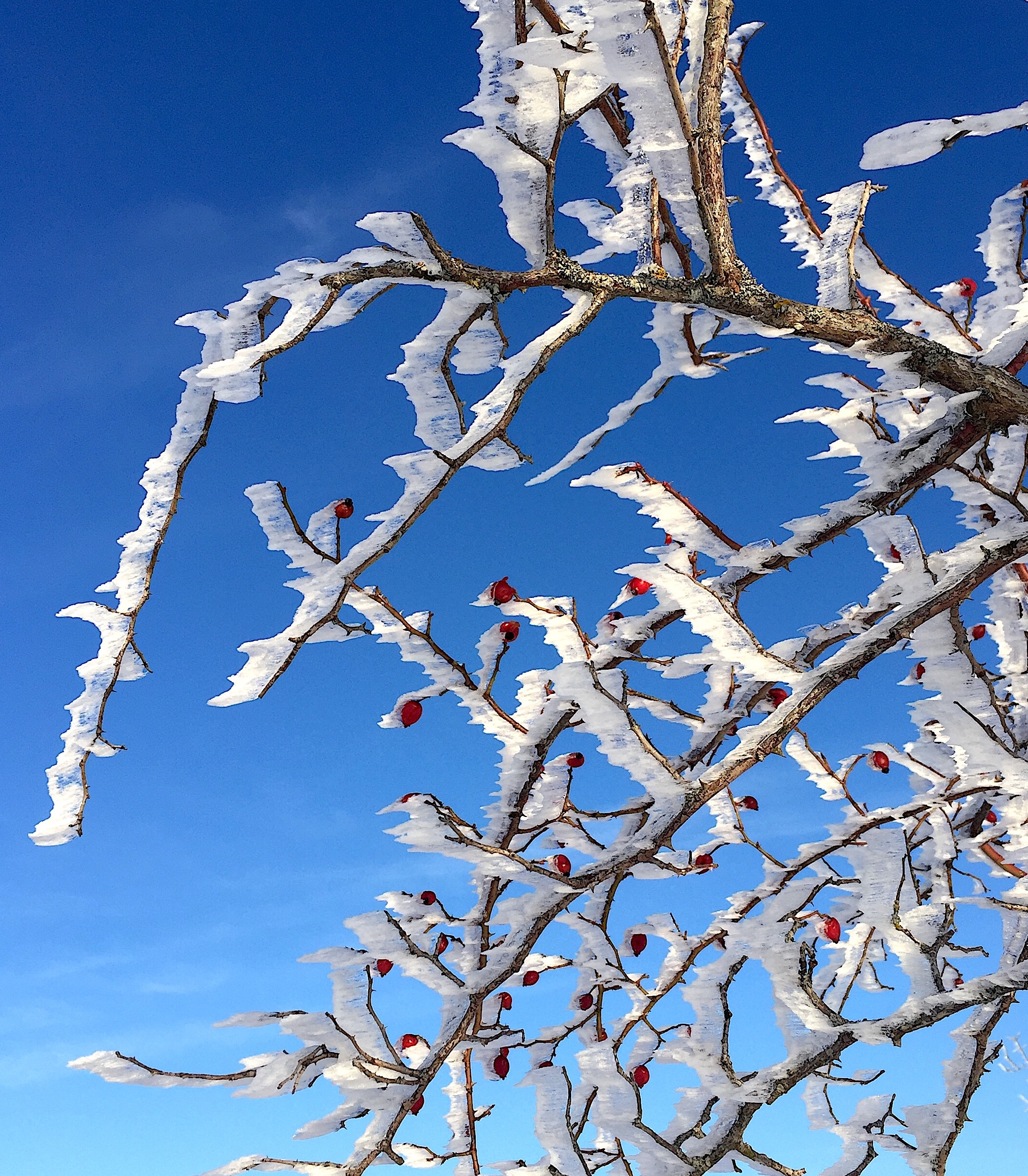 Rosa canina in winter, Swabian Jura